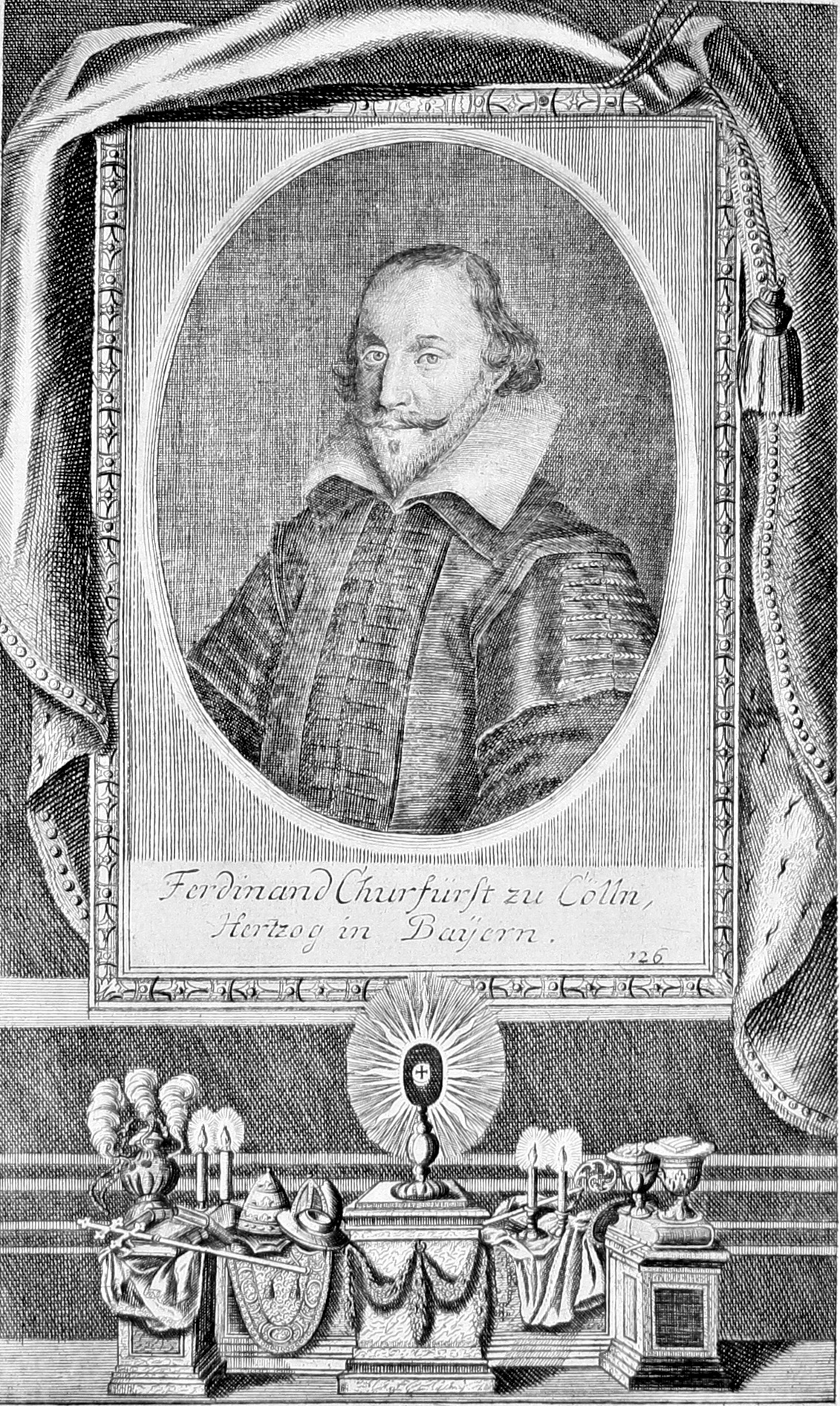 Ferdinand von bayern, Erzbischof von Köln